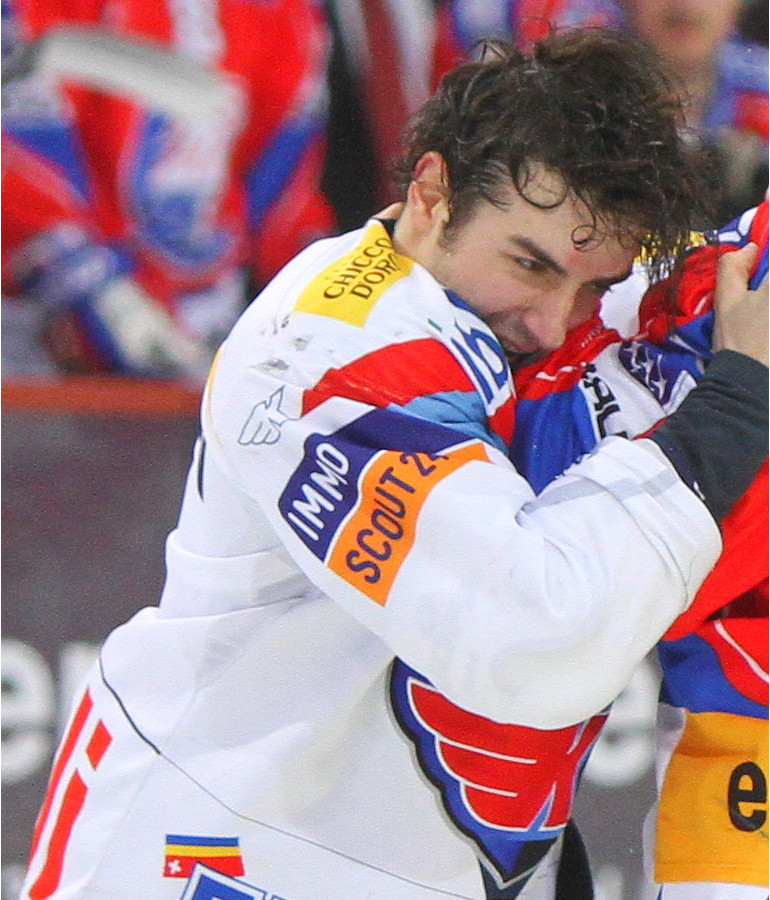 Le joueur des Kloten Flyers Dennis Hollenstein